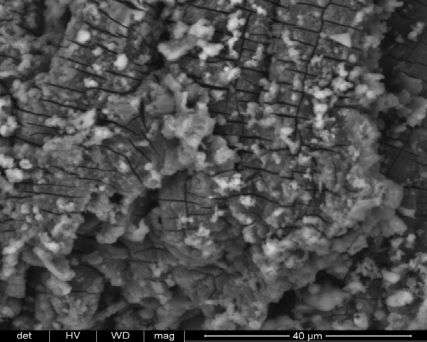 Fragment d'estella de fusta (zones amb esquerdes de dessecació) amb incrustacions de schwertmannita.